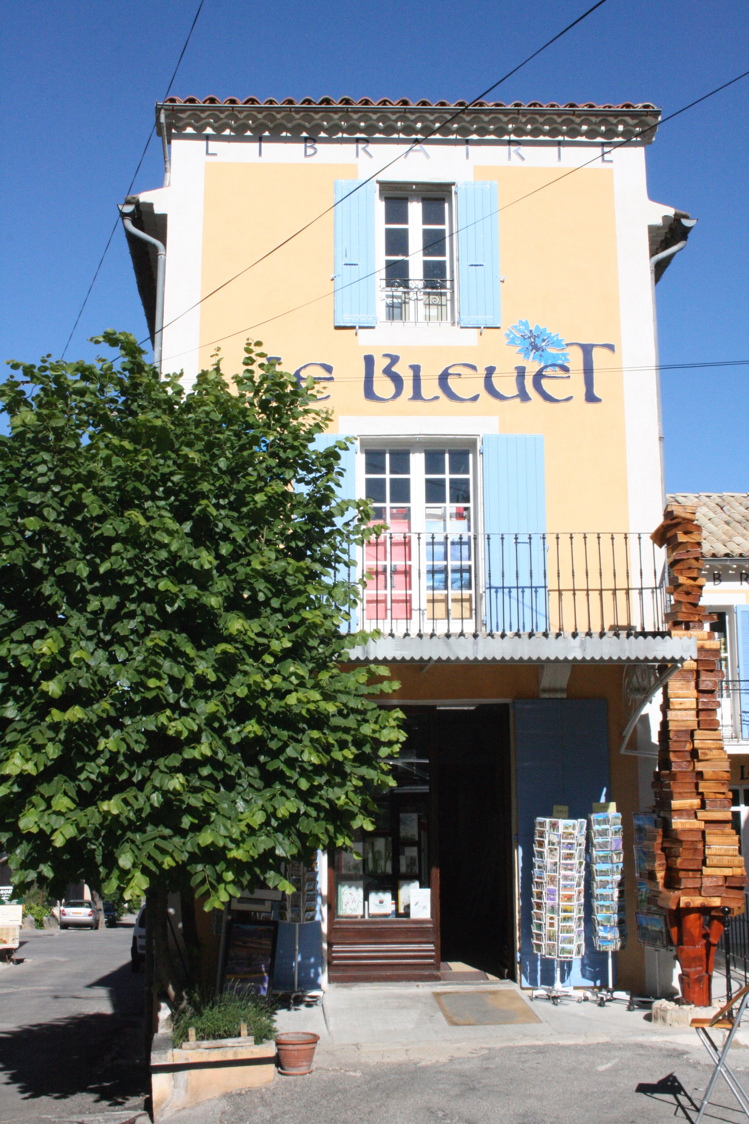 Banon, département des Alpes-de-Haute-Provence (France). Librairie "Le Bleuet"